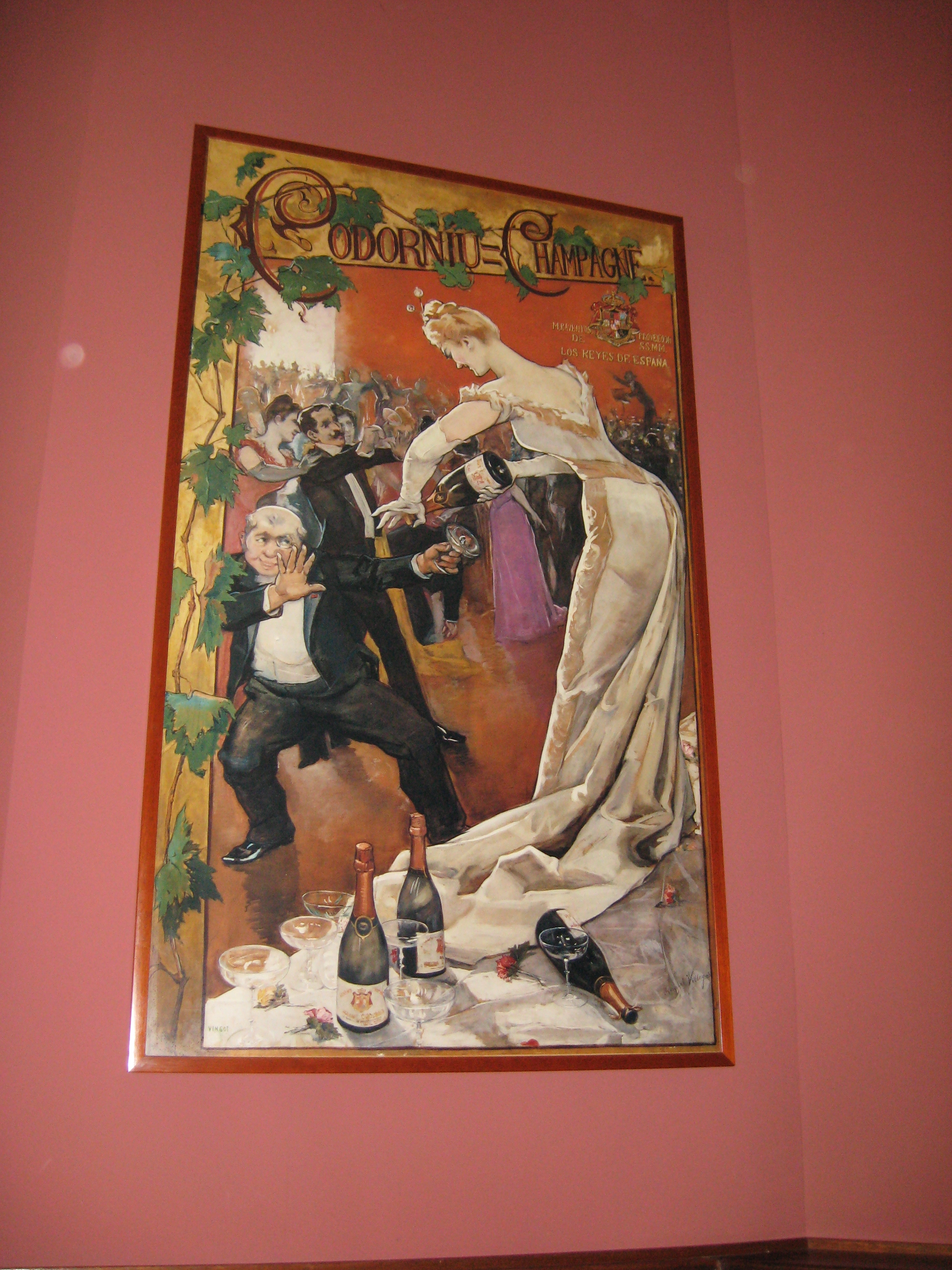 Codorníu Wandbild in einer Bar in Sant Feliu de Guíxols Datum: 21.09.2011 Urheber: M. Pfeiffer alias Benutzer:Gordito1869 (mittels Selbstauslöser) Quelle: Privates Fotoarchiv des Urhebers Hinweis: Fotografie eines zweidimensionalen Kunstwerkes